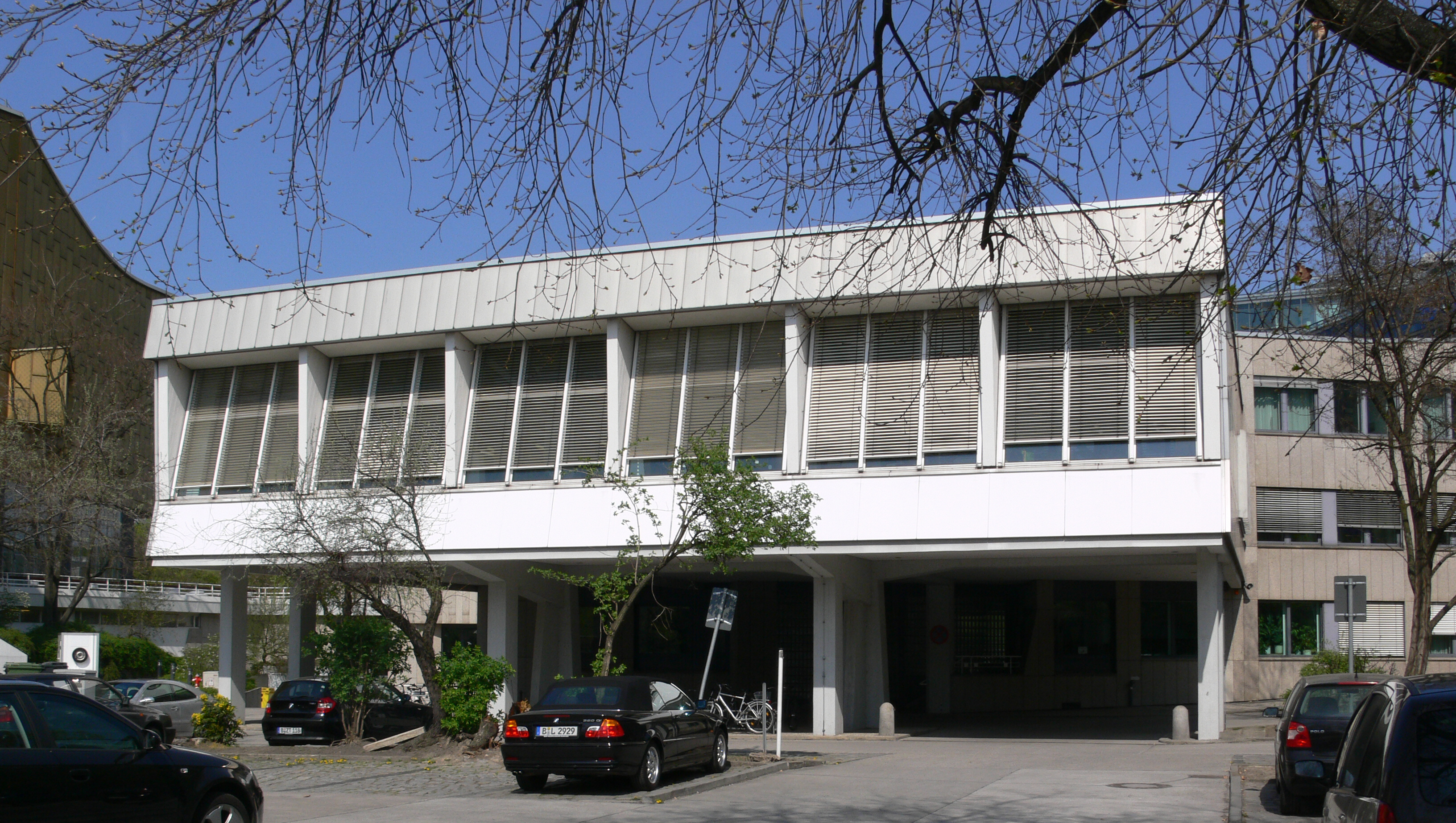 Berlin-Tiergarten, Musikinstrumentenmuseum